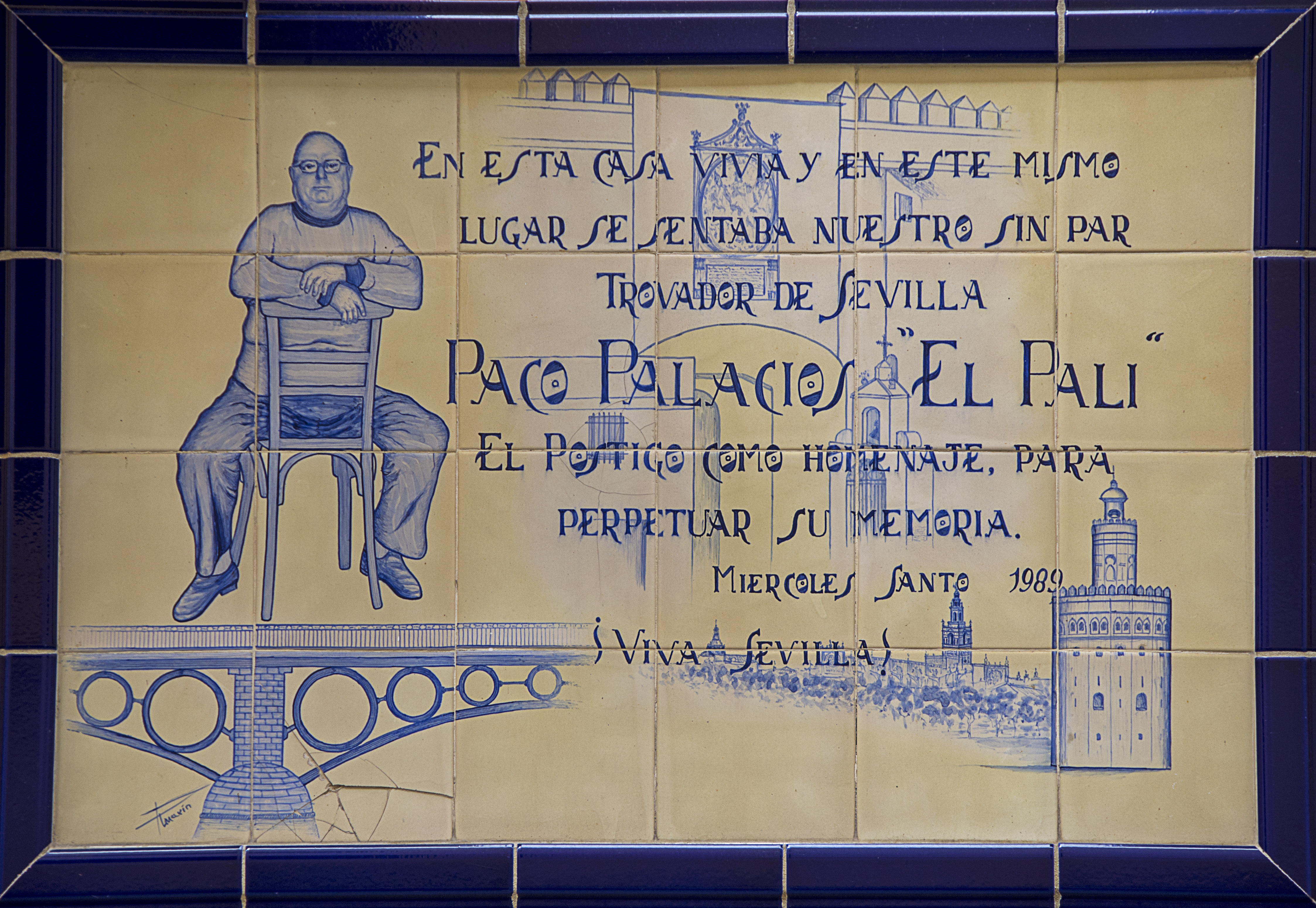 Conjunto de azulejos en homenaje al Pali. Calle Tomás de Ibarra en Sevilla.